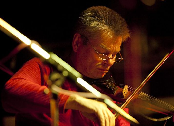 Рыженко Сергей